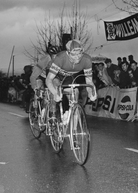 Amstel Gold Race 1970, Erik de Vlaeminck in aktie